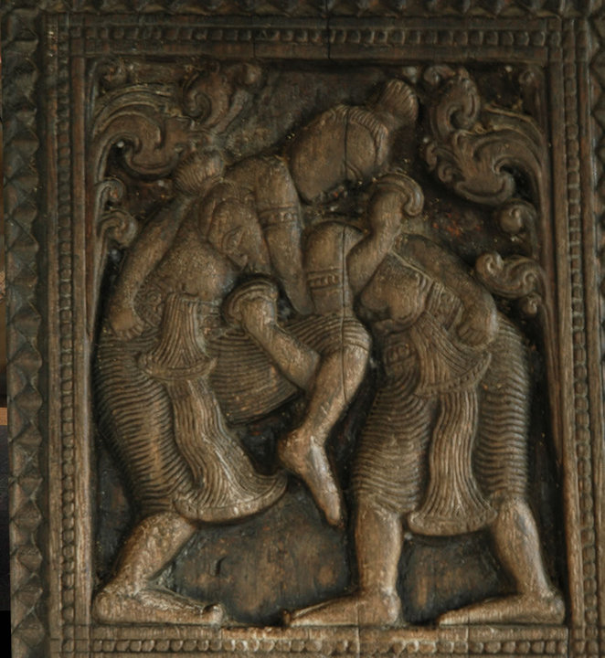 සිංහල: Historical Ambekke Gal Ketayam